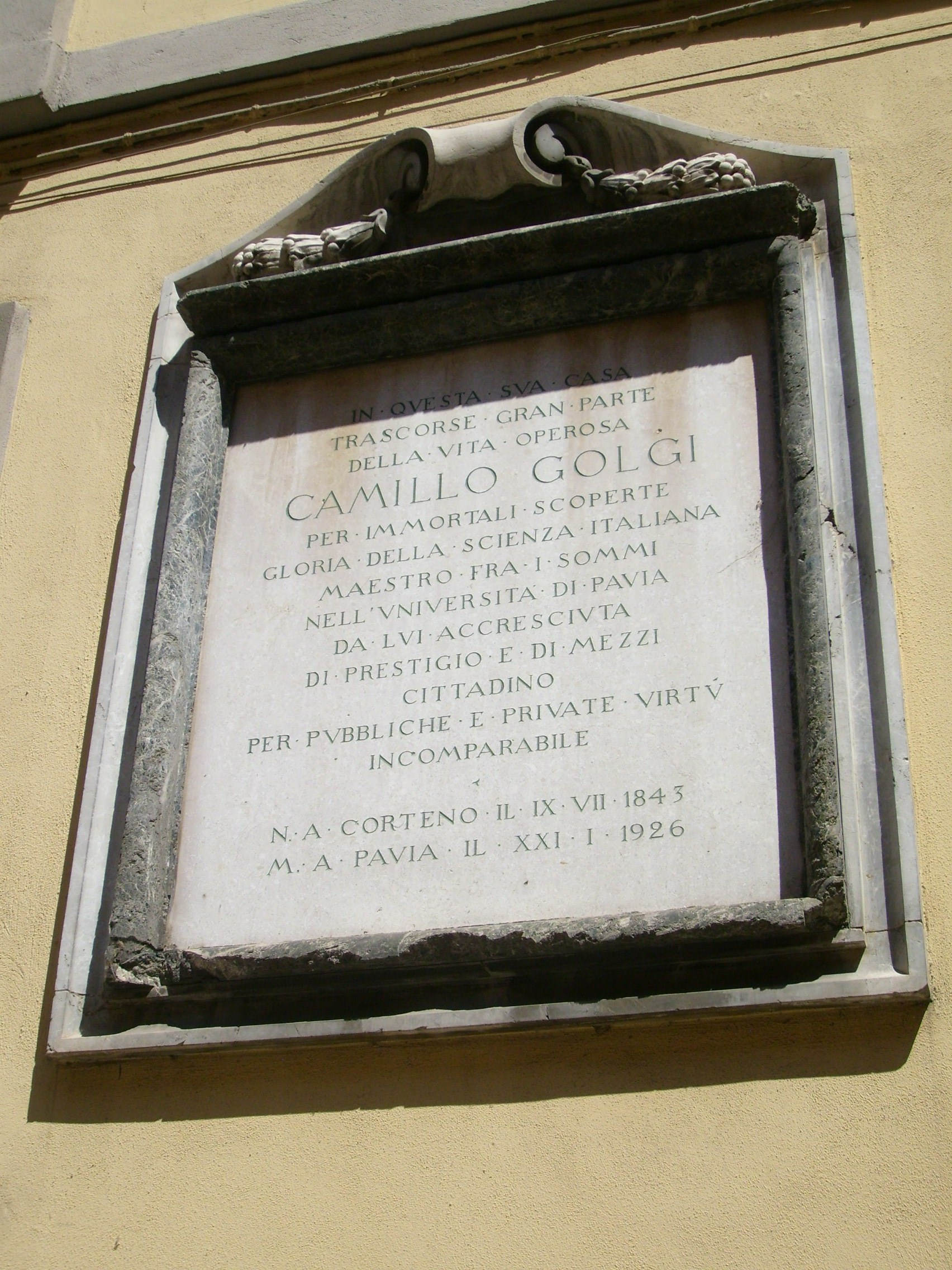 Plaque on Camillo Golgi's home, Strada Nuova, Pavia, Italy.